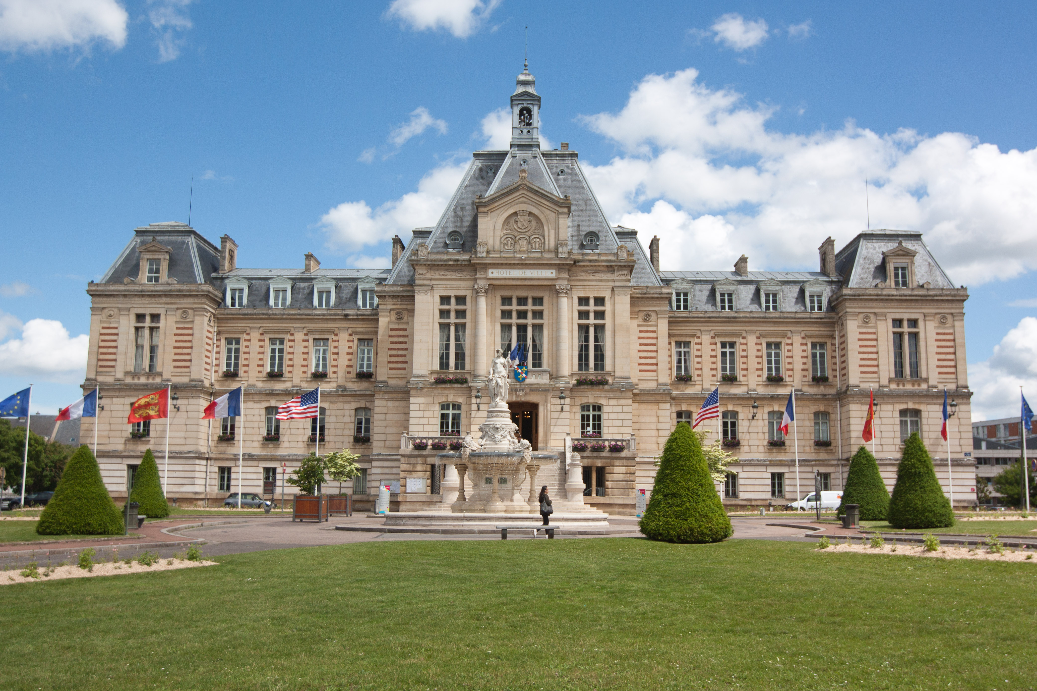 Hôtel de Ville d'Évreux // Évreux - Eure - France